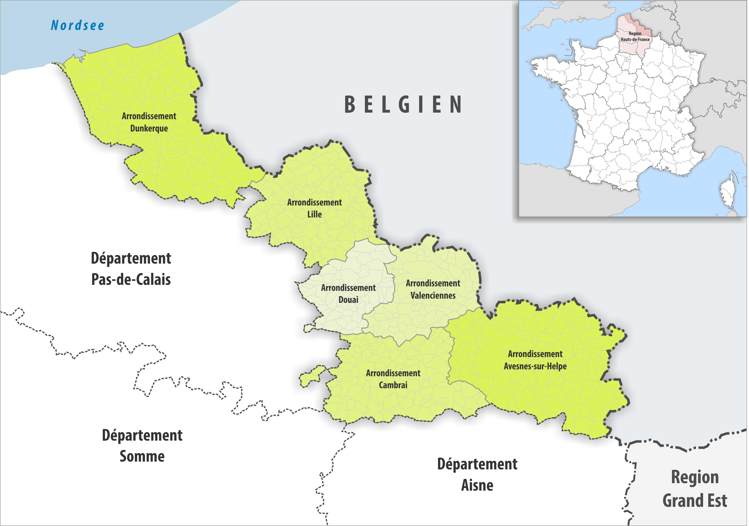 Gemeinden und Arrondissemente im Departement Nord